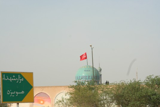 مزار شهدای هویزه